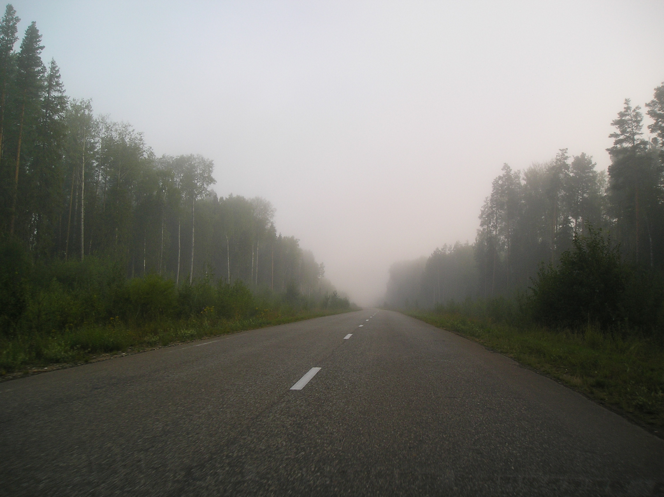 Путь в туман.